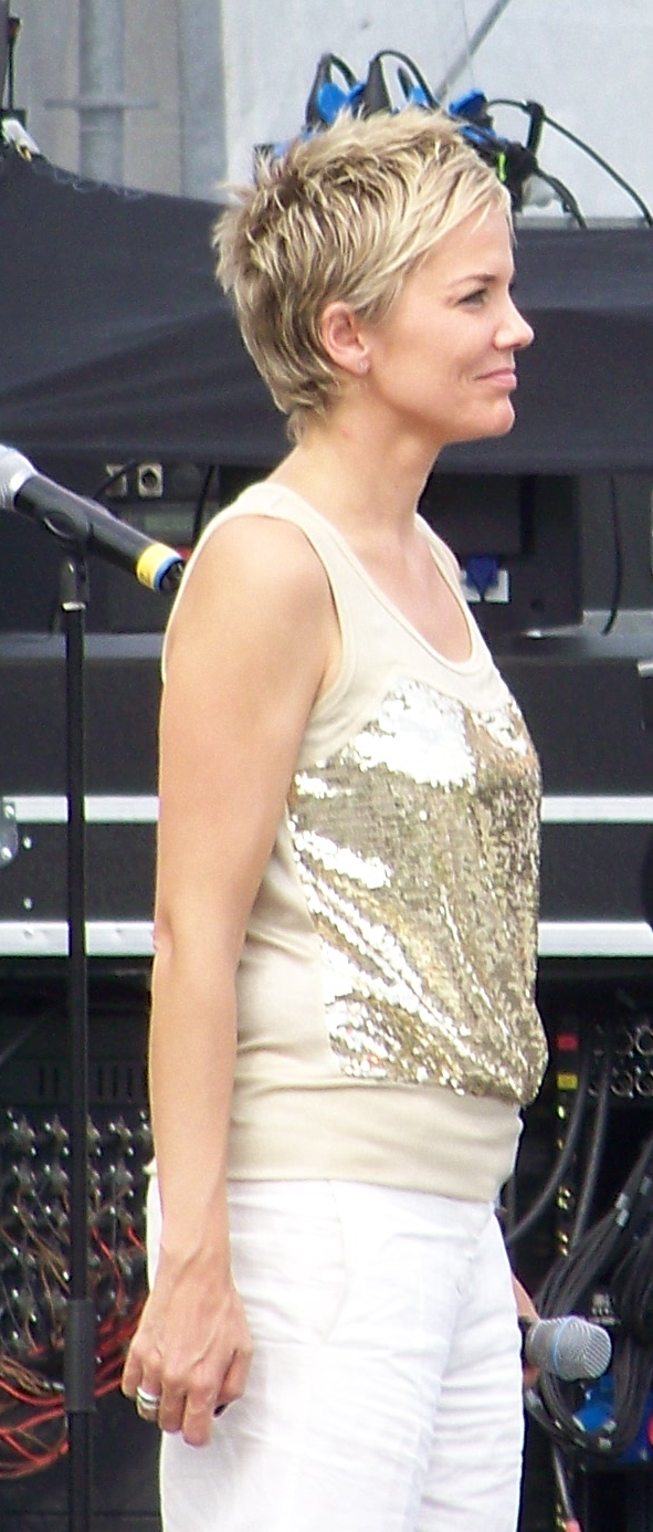 Inka Bause, Moderation im IFA-Sommergarten